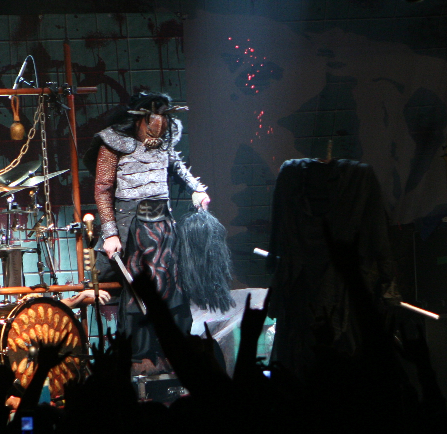 Lordi en la Sala Apolo de Barcelona el 20 de Febrero de 2009